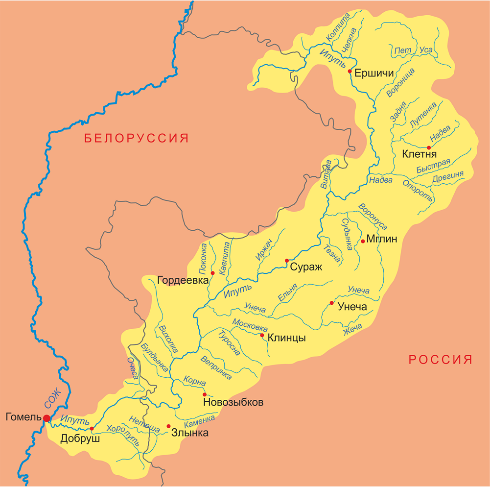 Схема бассейна реки Ипуть